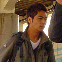 「列島縦断 鉄道乗りつくしの旅〜JR20000km全線走破〜」放送のため海芝浦駅に降り立つ関口知宏氏